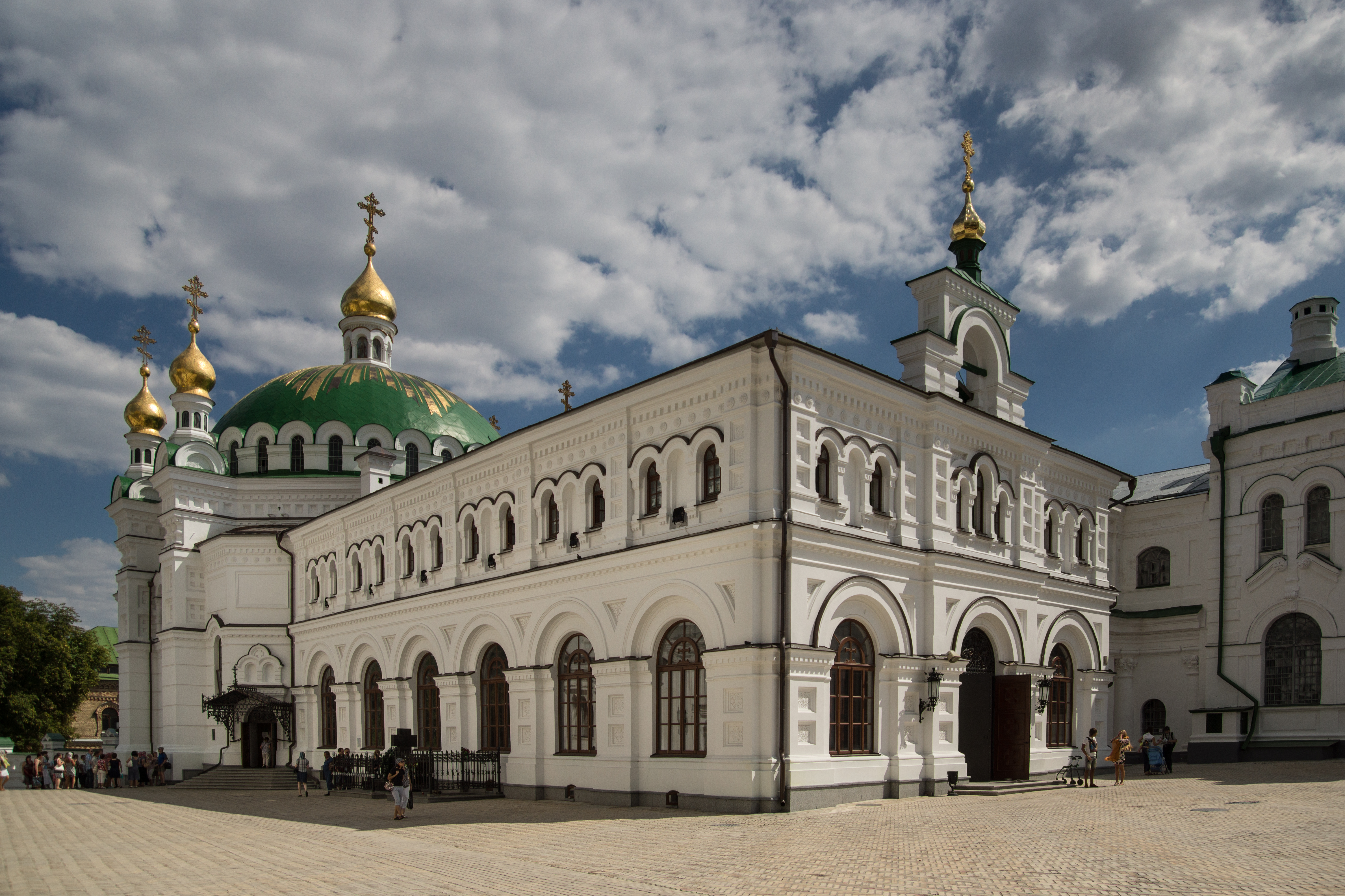 Трапезна церква Антонія і Феодосія Печерських